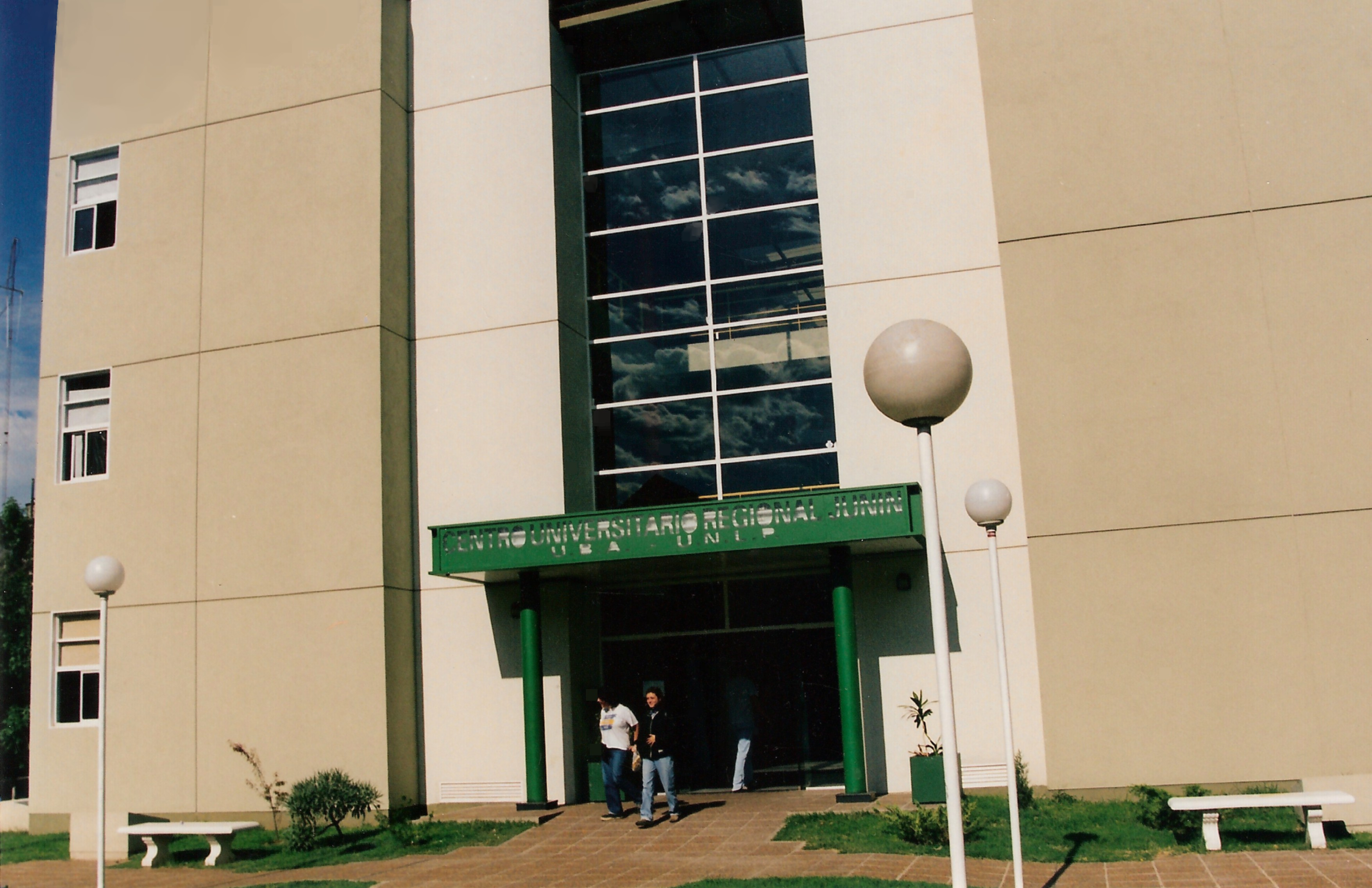 Universidad Nacional del Noroeste de la Provincia de Buenos Aires, en Junín, Argentina. Entrada al edificio ubicado en Rivadavia y Newbery. Al momento de tomar la foto, el edificio pertenecía al Centro Universitario Regional Junín.